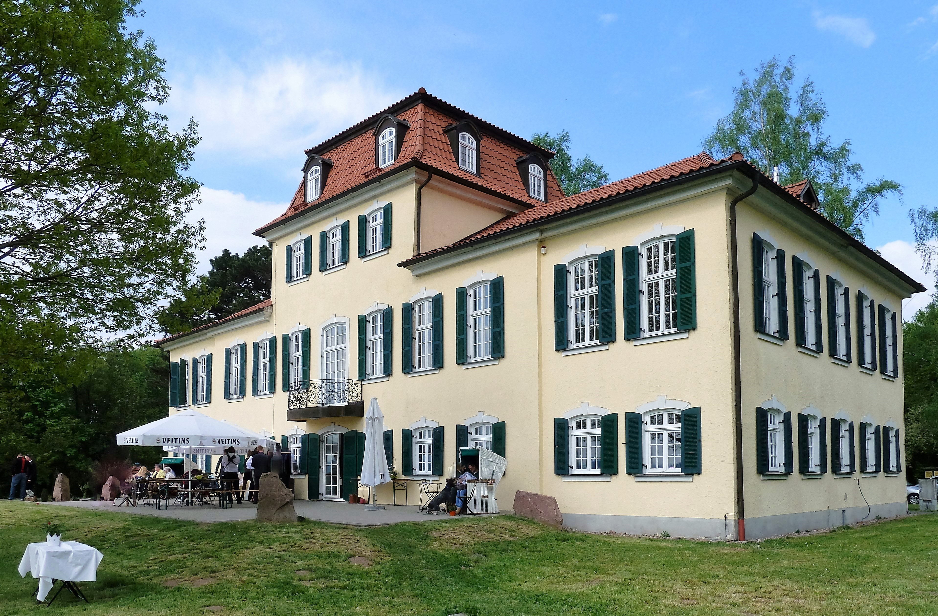 Jagdschloss Fasanerie bei Hermannsfeld/Gemeinde Rhönblick, erbaut 1790 von Herzog Georg I. von Sachsen-Meiningen